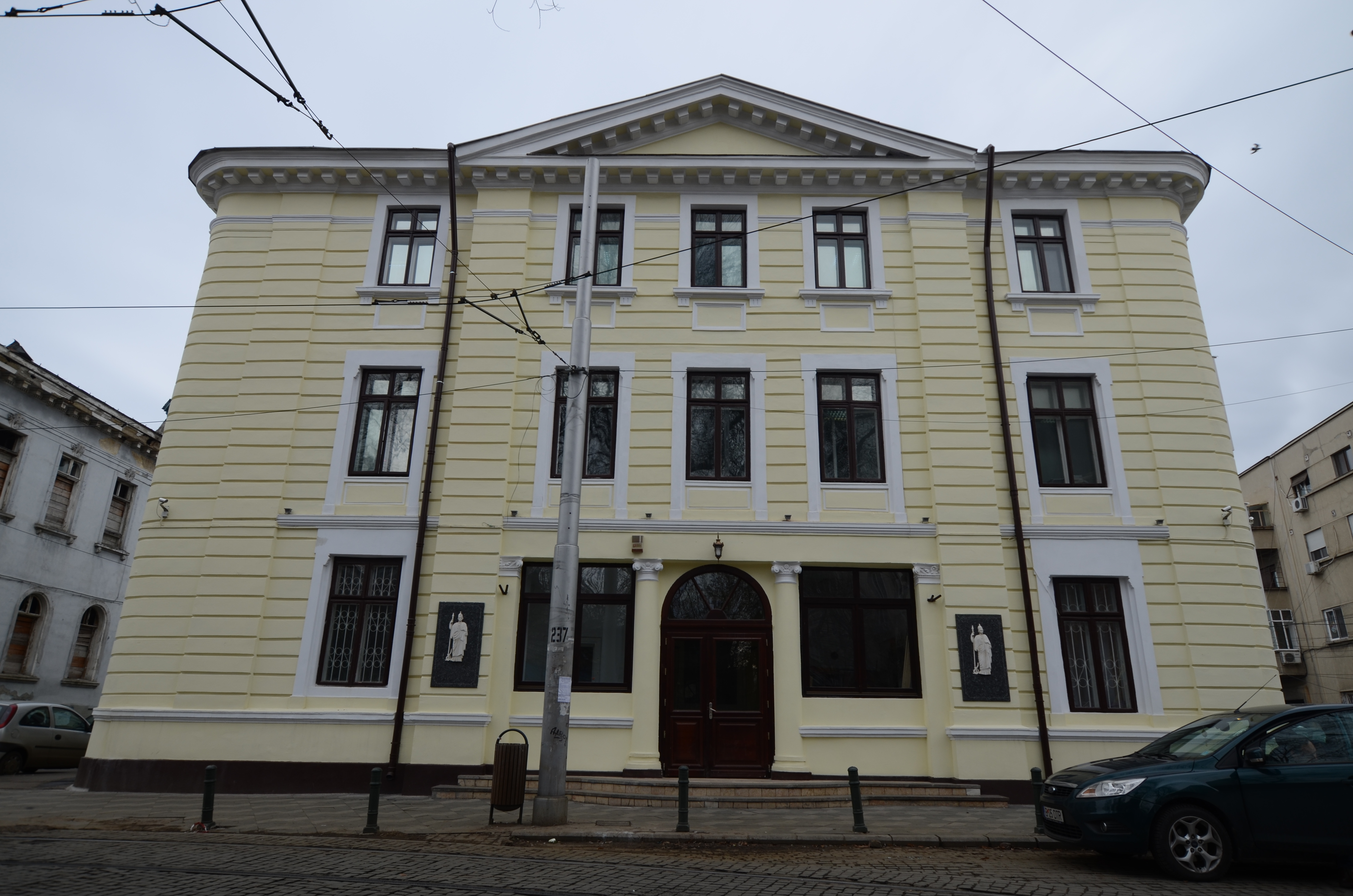 Casă, Str. Băniei nr. 23, București